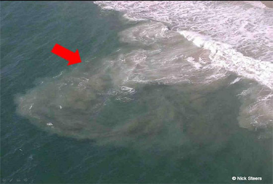 rip akıntısııı